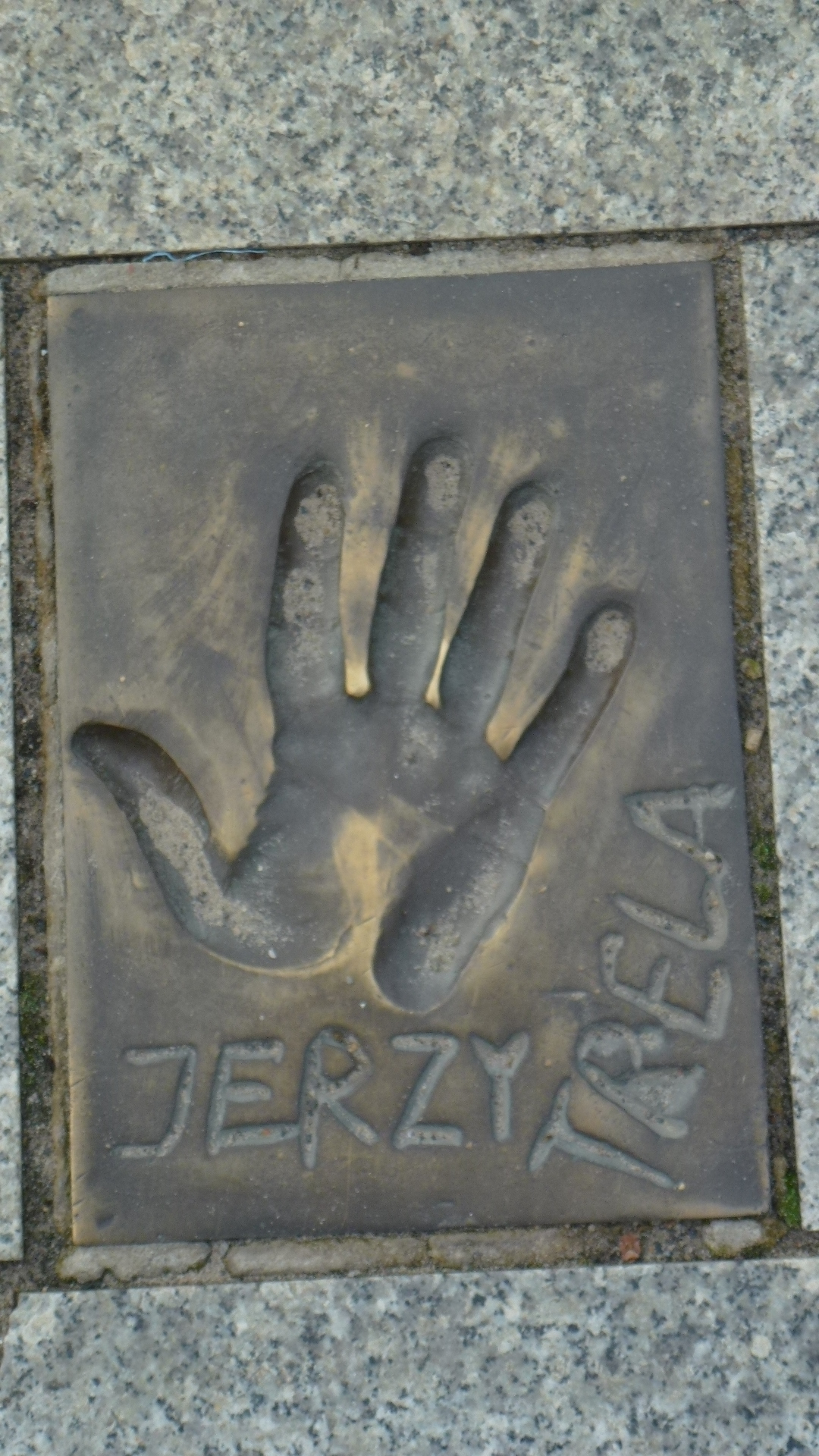 Odcisk gwiazdy na ul. Aleji Gwiazd w Międzyzdrojach woj. zachodniopomorskie pow. kamieński